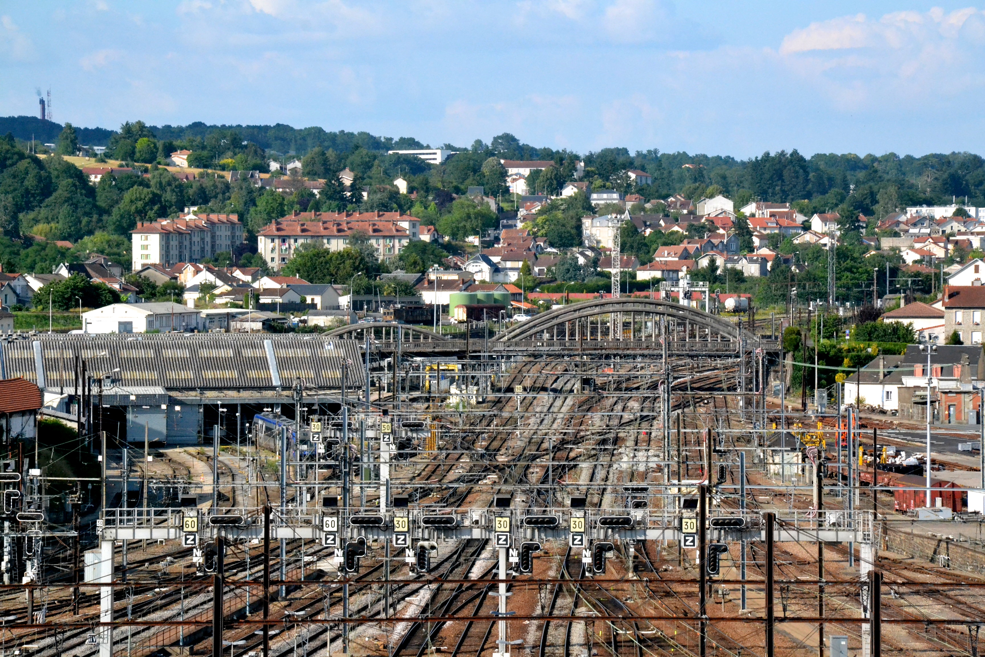 Les voies ferrées depuis la gare de Limoges-Bénédictins, en direction de Paris.